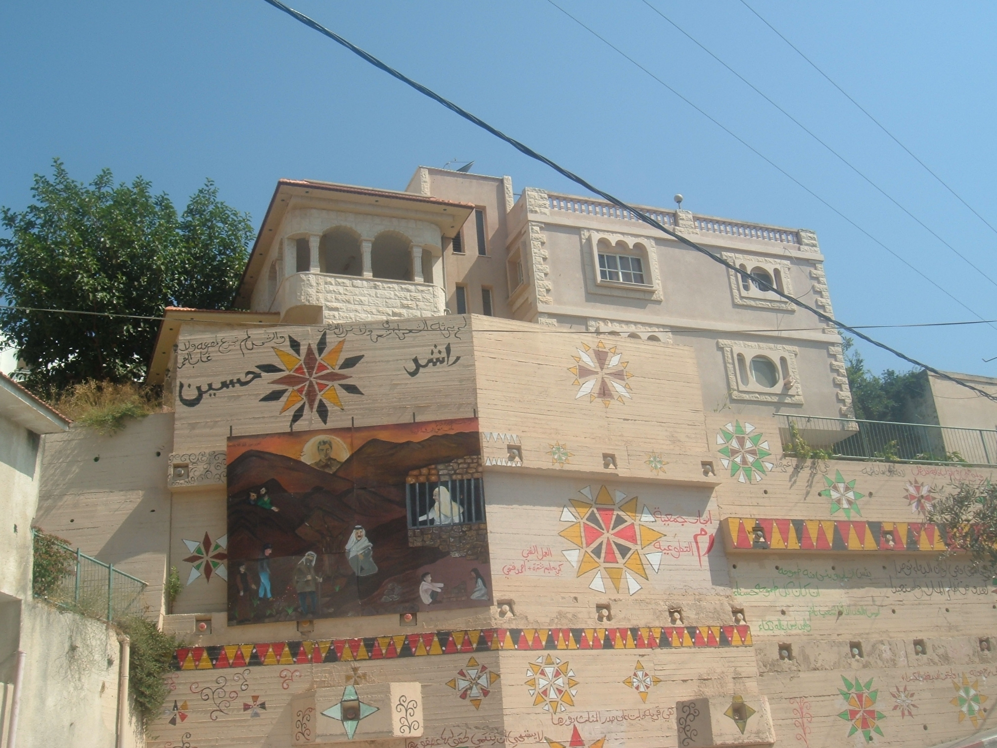 wall paintings in musmus, Israel קיר תומך מעוטר בציורים בכפר מוצמוץ, ישראל